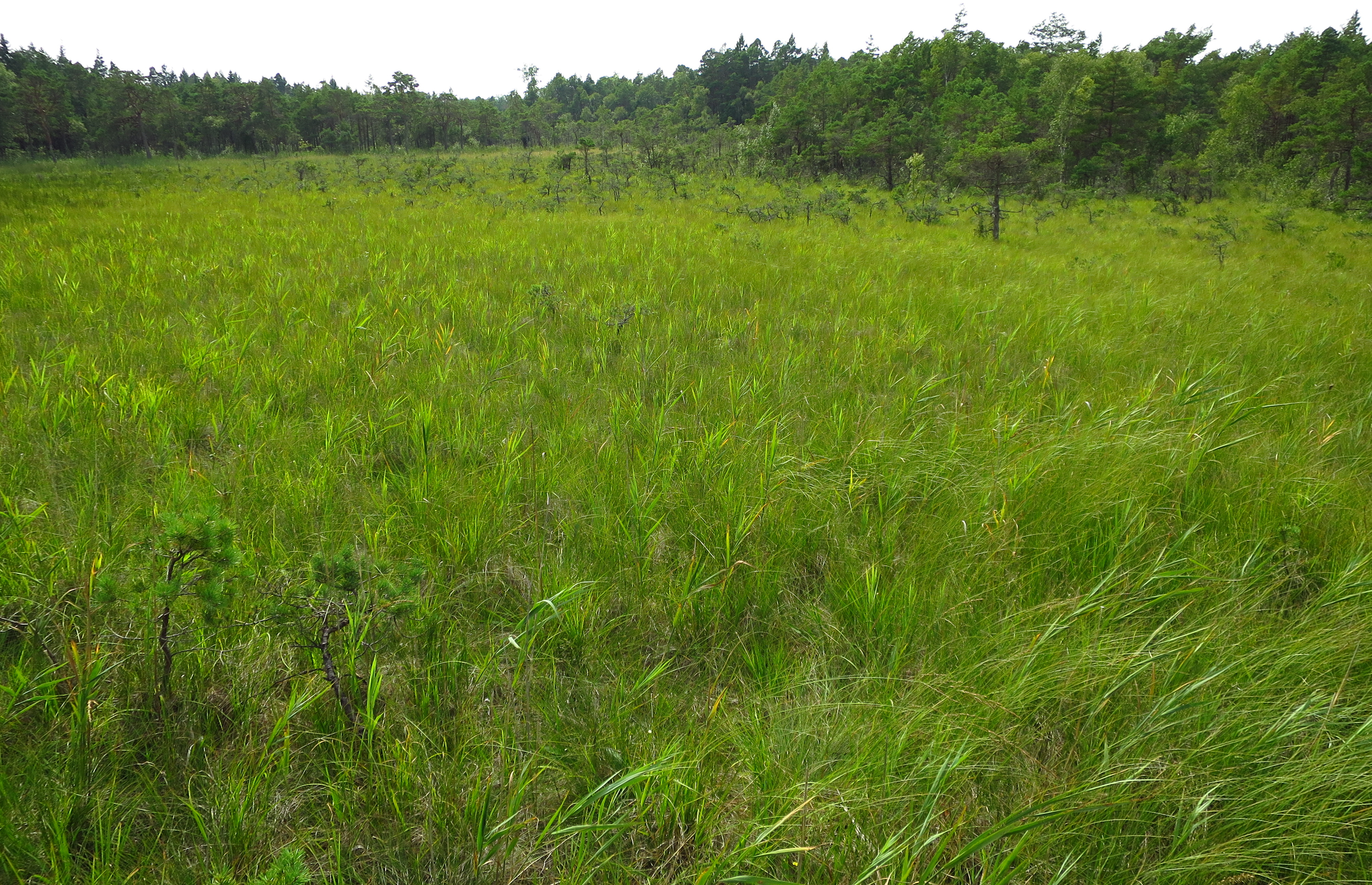 Allikasoo Viidumäe looduskaitsealal